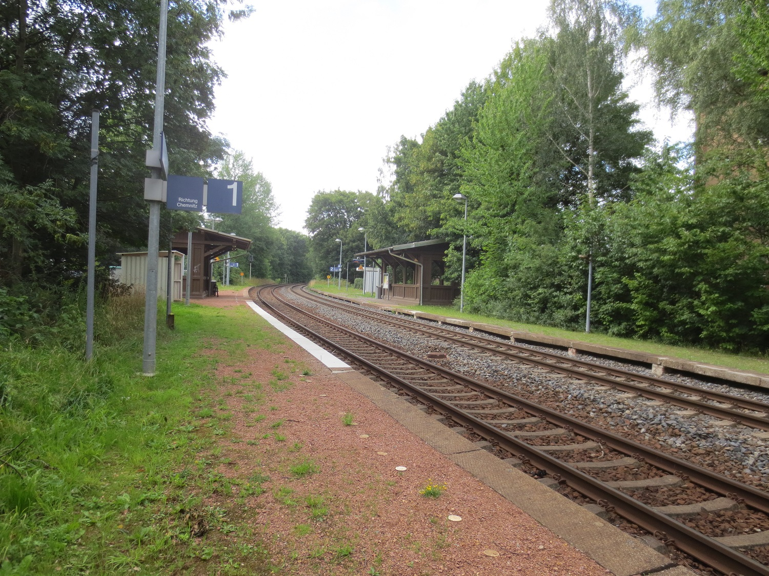 Chemnitz Borna-Heinersdorf Haltepunkt Bahnhof. Haltepunkt für Regionalzüge Chemnitz-Burgstädt. Auch Schienenweg zwischen Chemnitz und Leipzig HBF. Fernzüge halten hier nicht. Haltepunkt Citybahn ab 2016, Chemnitz Thalheim. Weitestgehend Original erhaltener Bahnhof. Schienenweg.